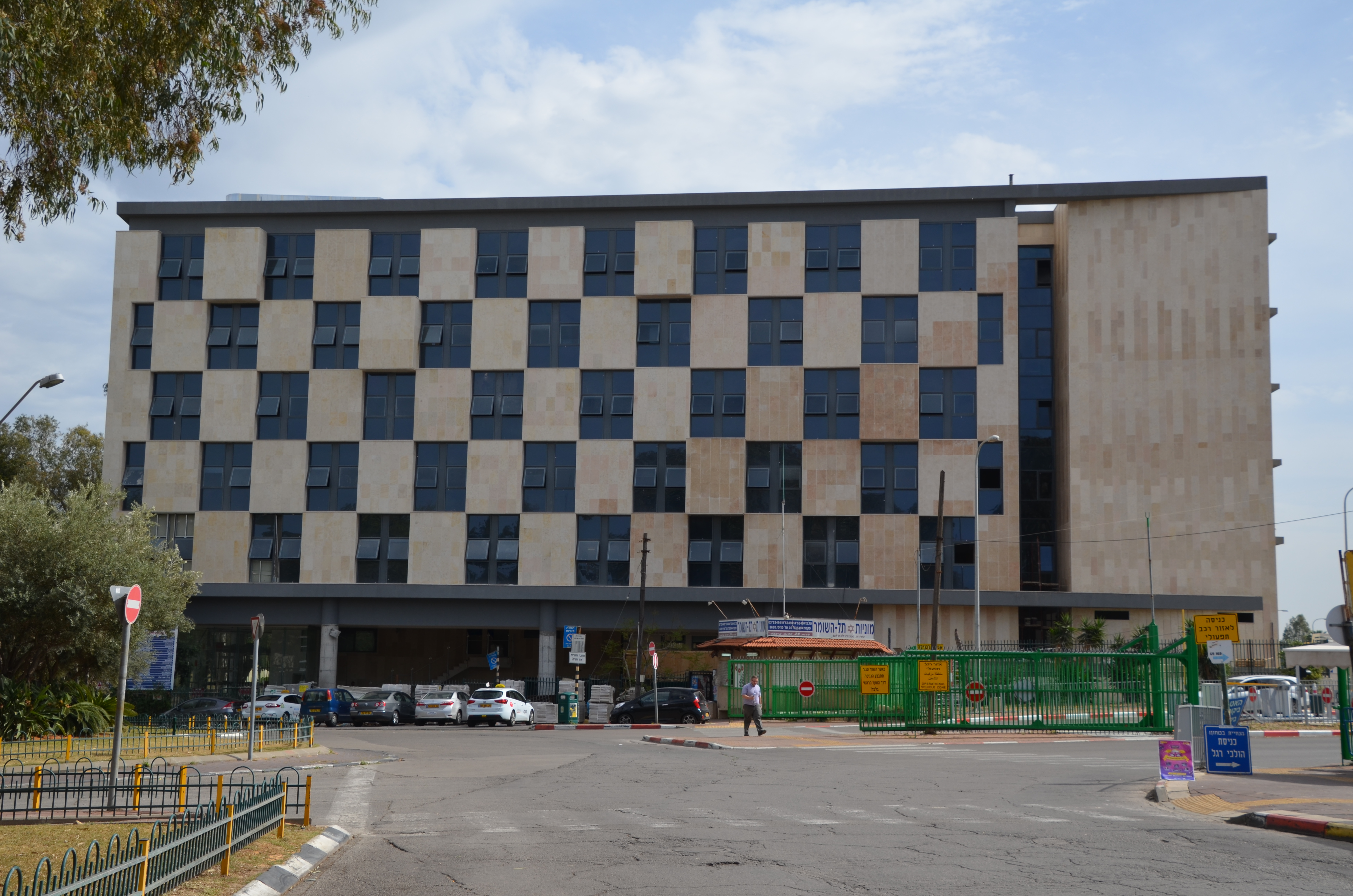 בניין חדש של המרכז הרפואי לאלצהיימר